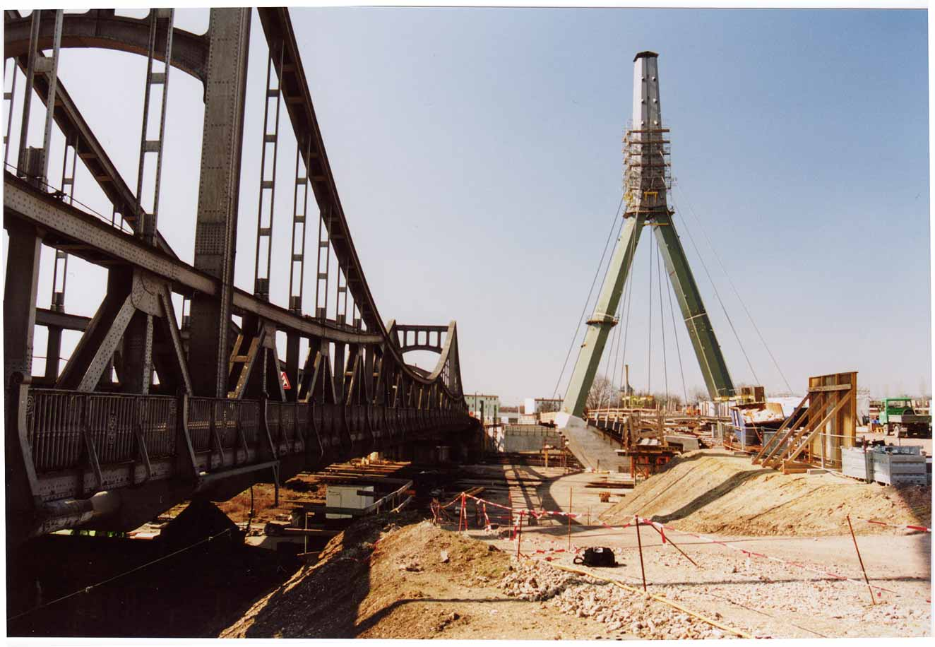 Berliner Brücke, Halle (Saale), Baustellenansicht von Osten